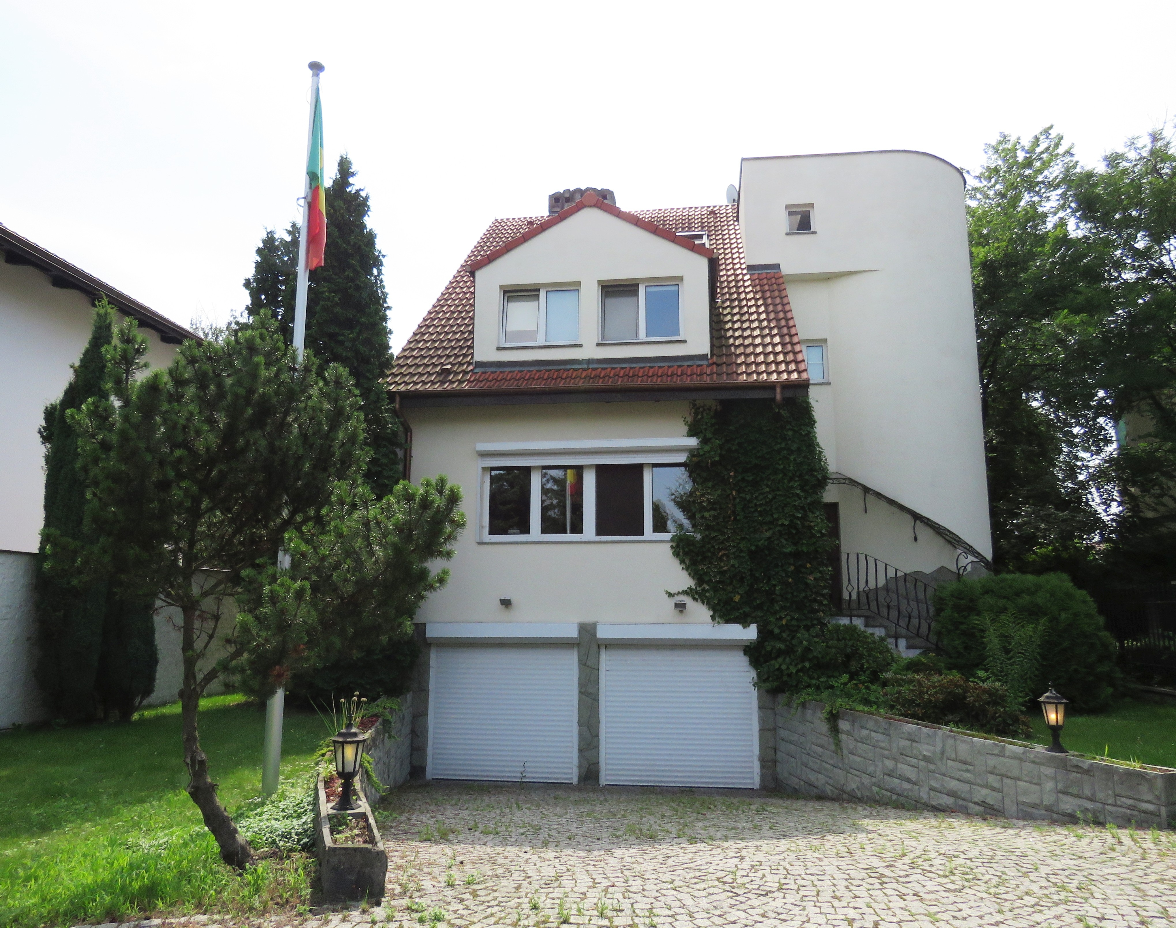 Ambasada Senegalu w Polsce